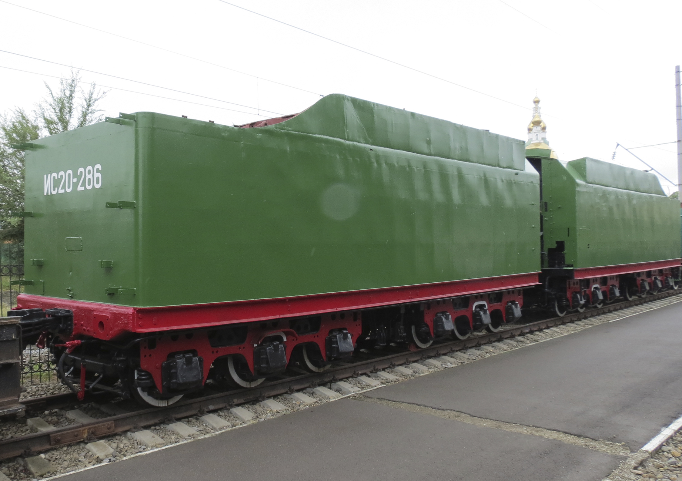 Тендера построены в 1939 году Луганским паровозостроительным заводом